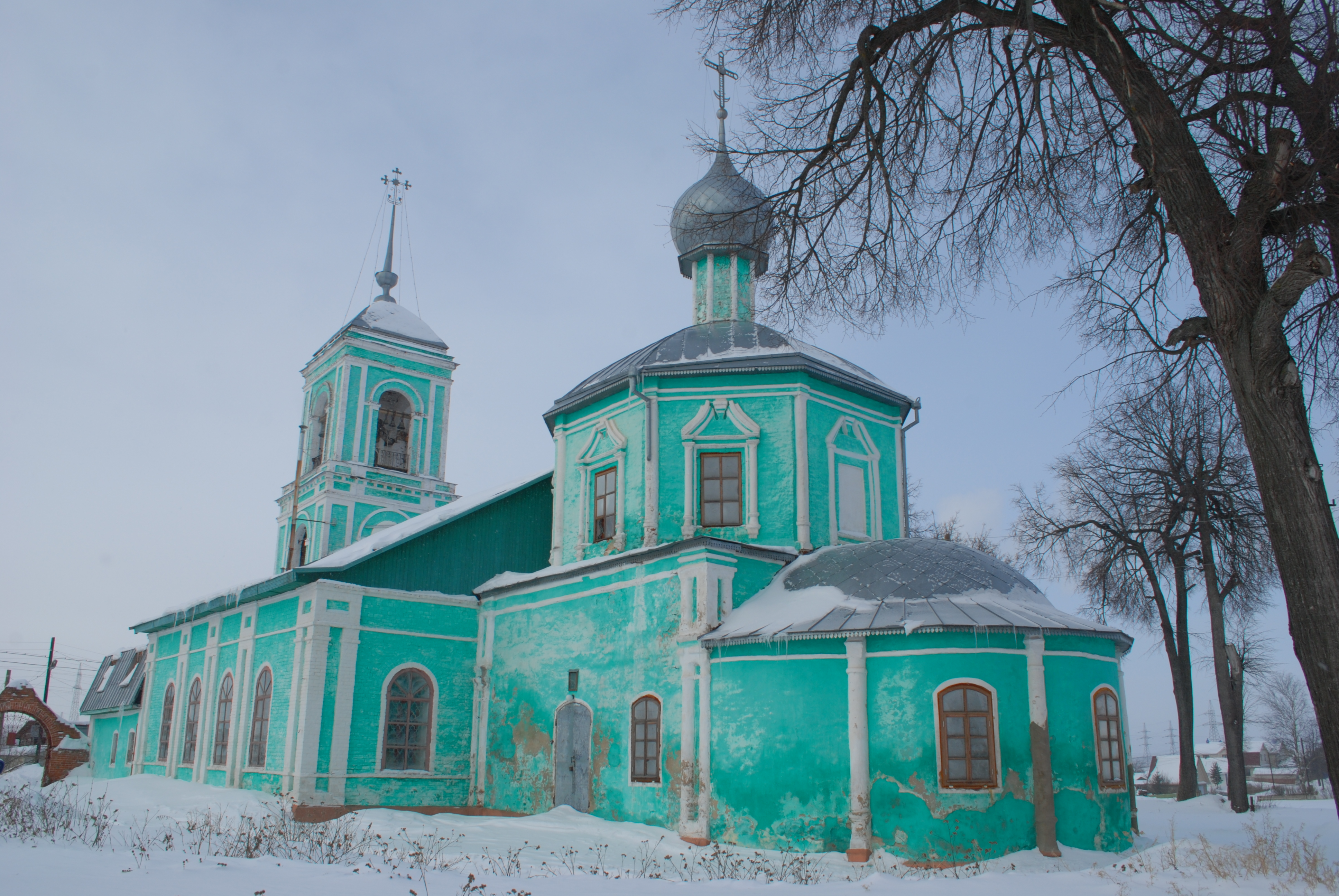 Церковь троицы (Ярославская область, Переславский район, село Большая Брембола)